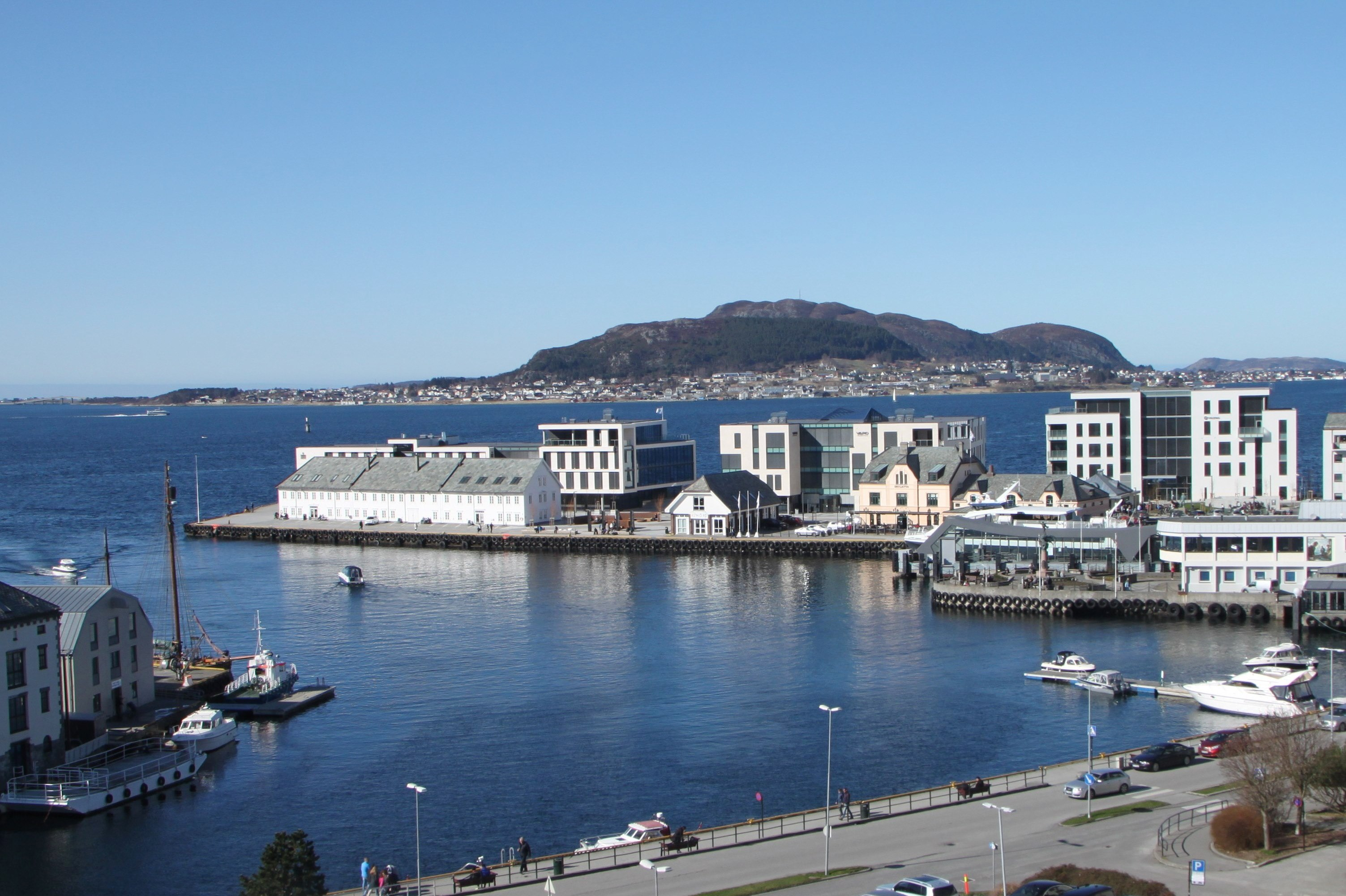 Skansekaia der Hurtigruten legger til. Bygningene på bildet huser blant annet Kystverket, tinghuset og flere rederier.